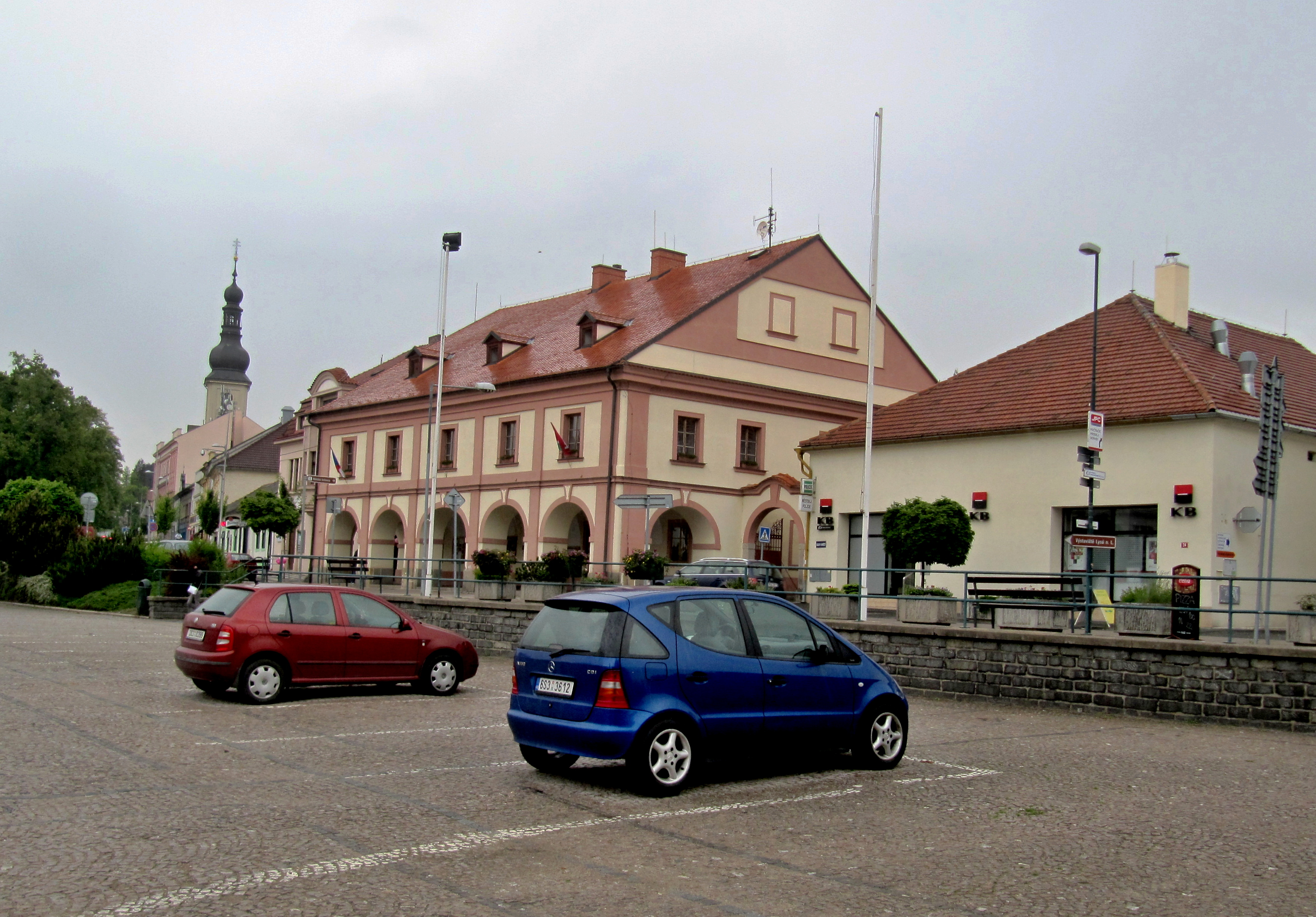 Lysá nad Labem, Husovo náměstí, severní strana